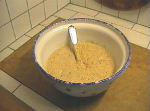 Pain poolish - pre-ferment (Pain à la poolish et au levain - la poolish)